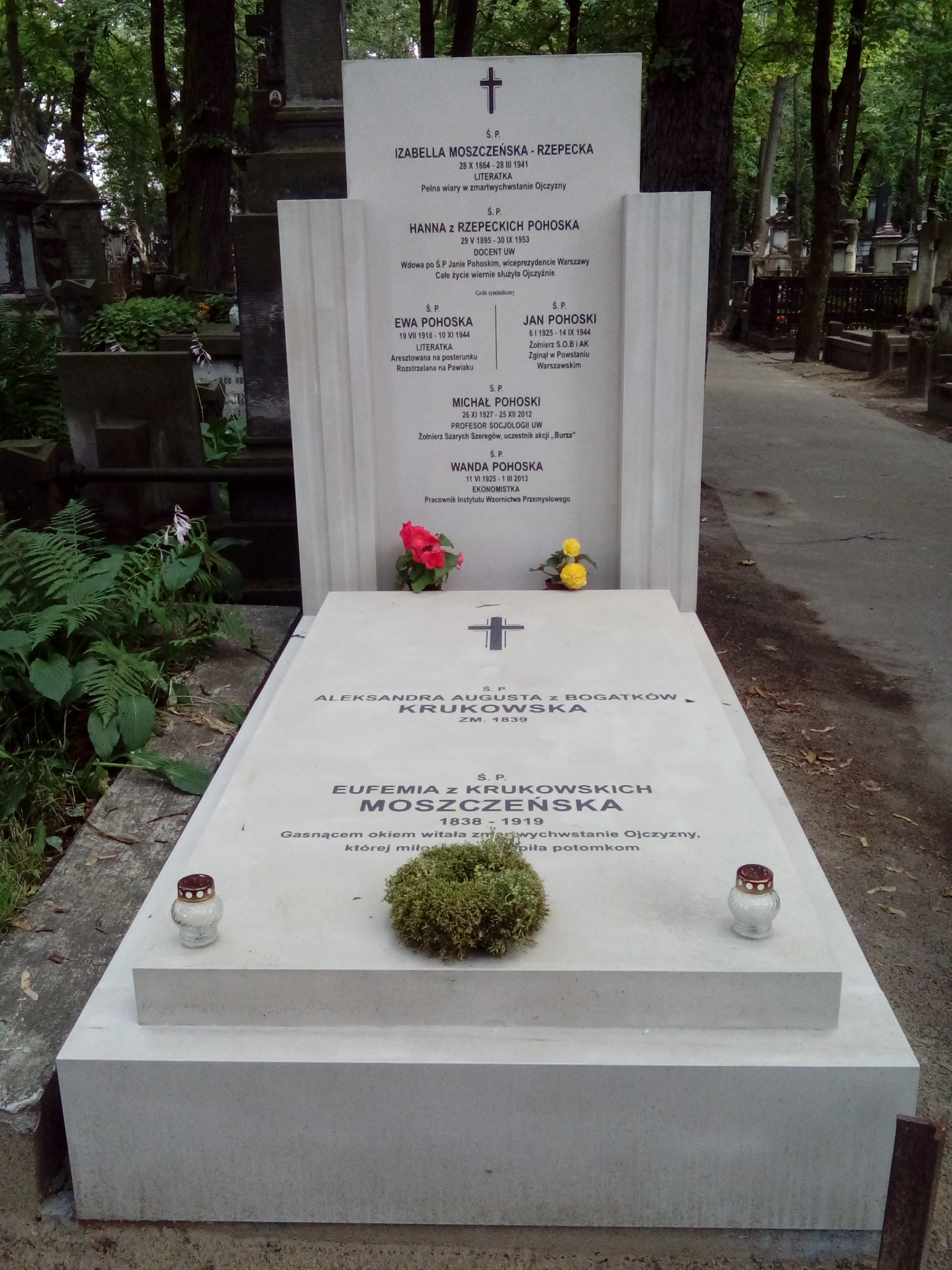 Grób Michała Pohowskego na Cmentarzu Powązkowskim